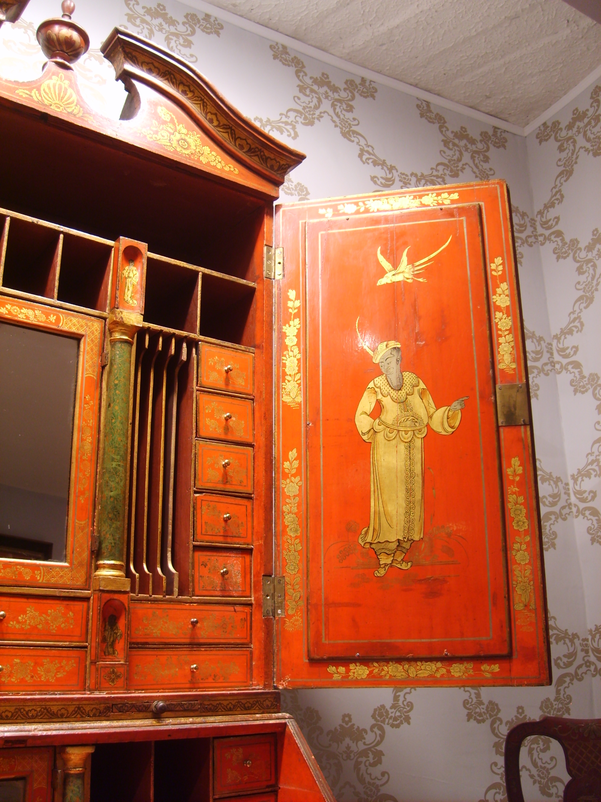 Escritorio inglés Chippendale hecho de madera pintada y dorada con motivos chinescos. Perteneció al Marqués de Casa Real. Siglo XVIII. Forma parte de la colección del Museo del Carmen de Maipú, en Santiago de Chile.